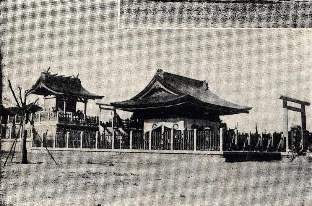 中文（台灣）: 台灣日治時期位於臺南州北門郡佳里街的北門神社，圖片現址為佳里公園